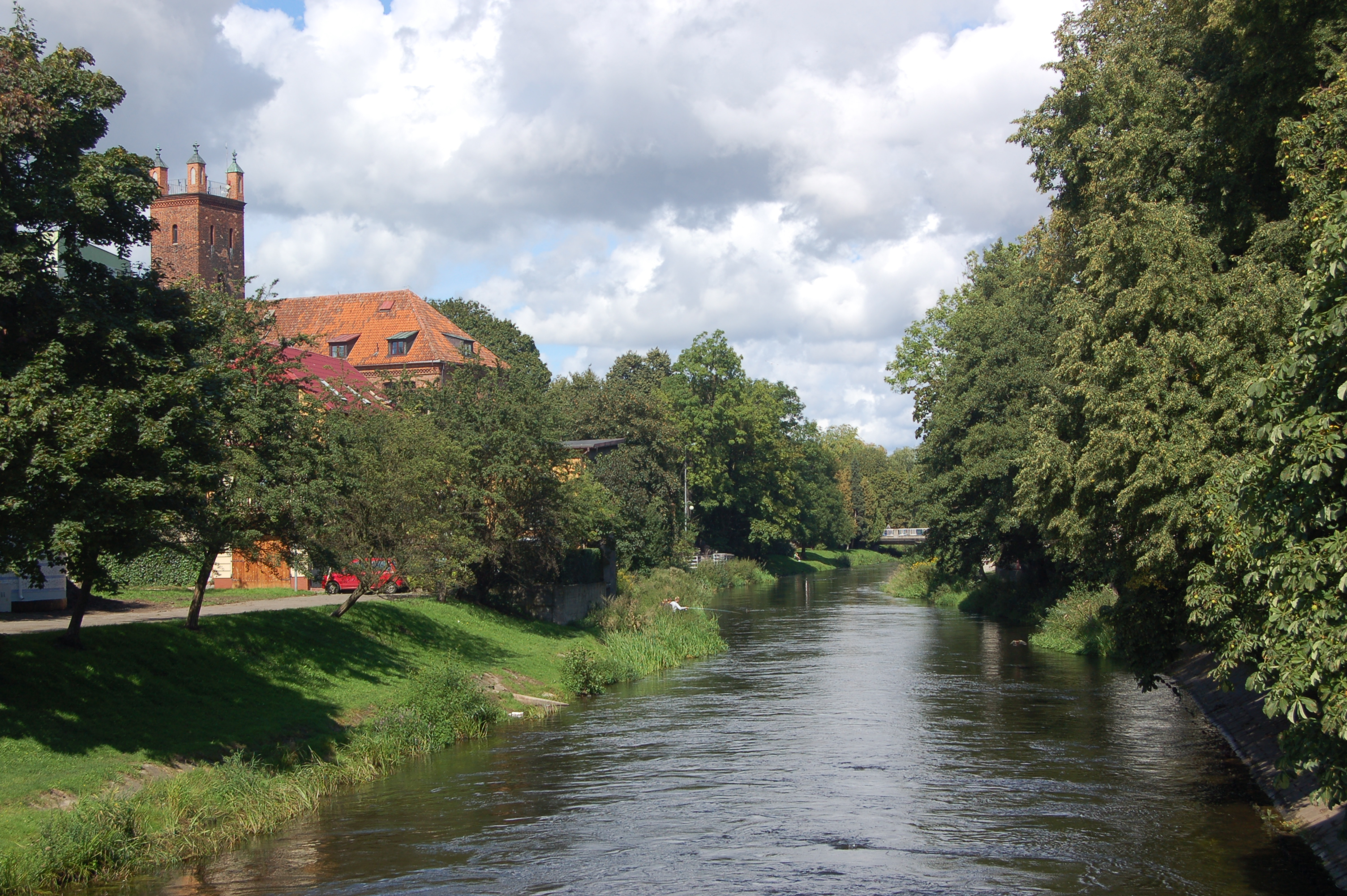 Kościół św. Mikołaja w Słupsku